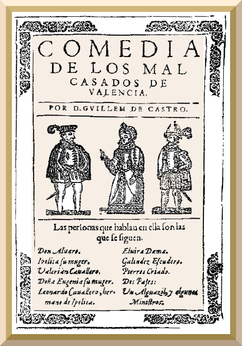 Los malcasados de Valencia, Valencia, Felipe Mey, 1618.